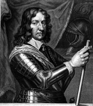 Heinrich